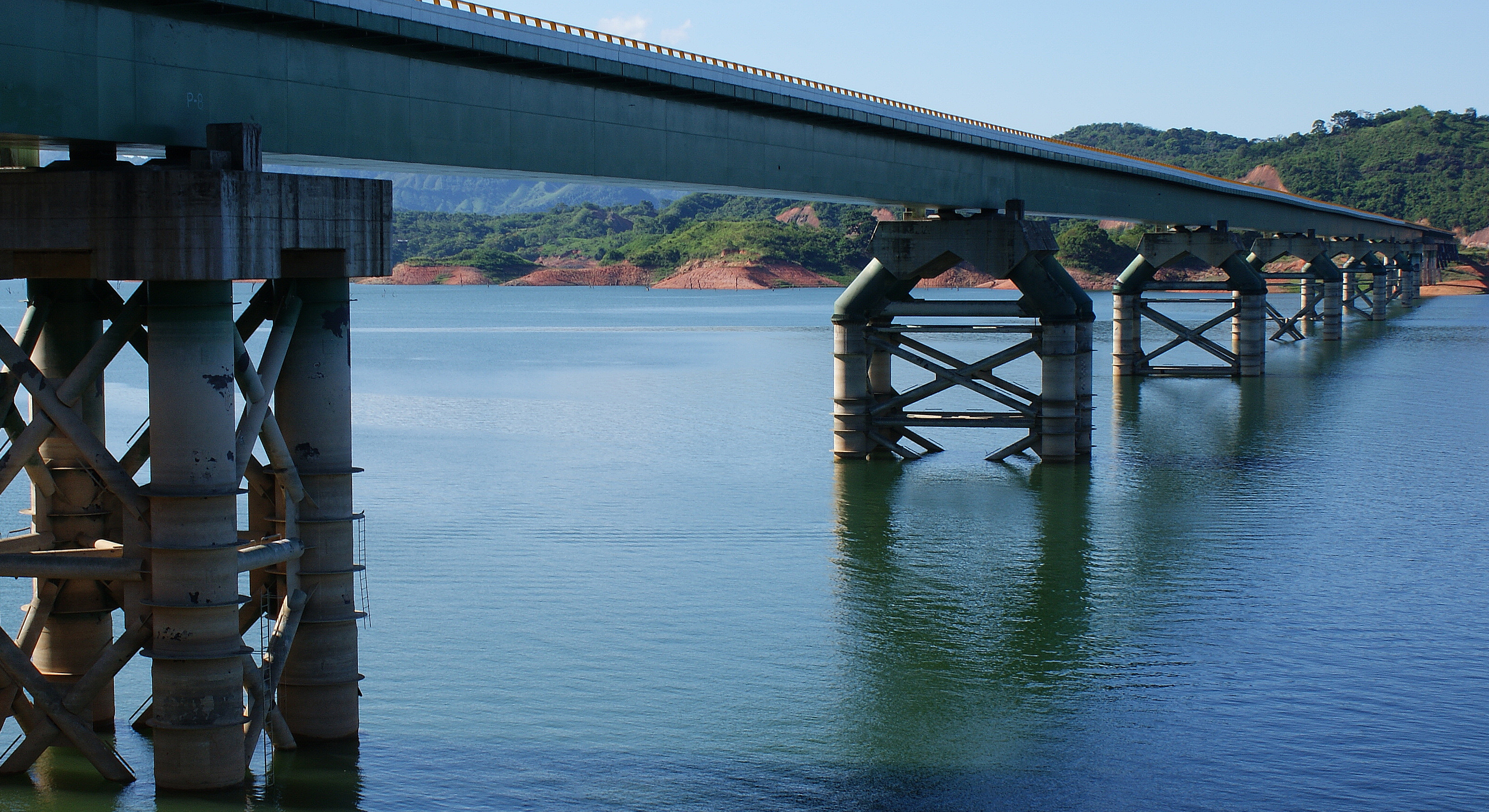 puente CHIAPAS México